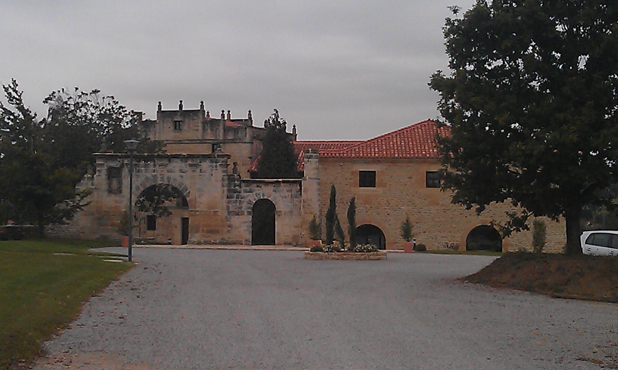 Palacio de Peredo en Mijares (Cantabria, España).